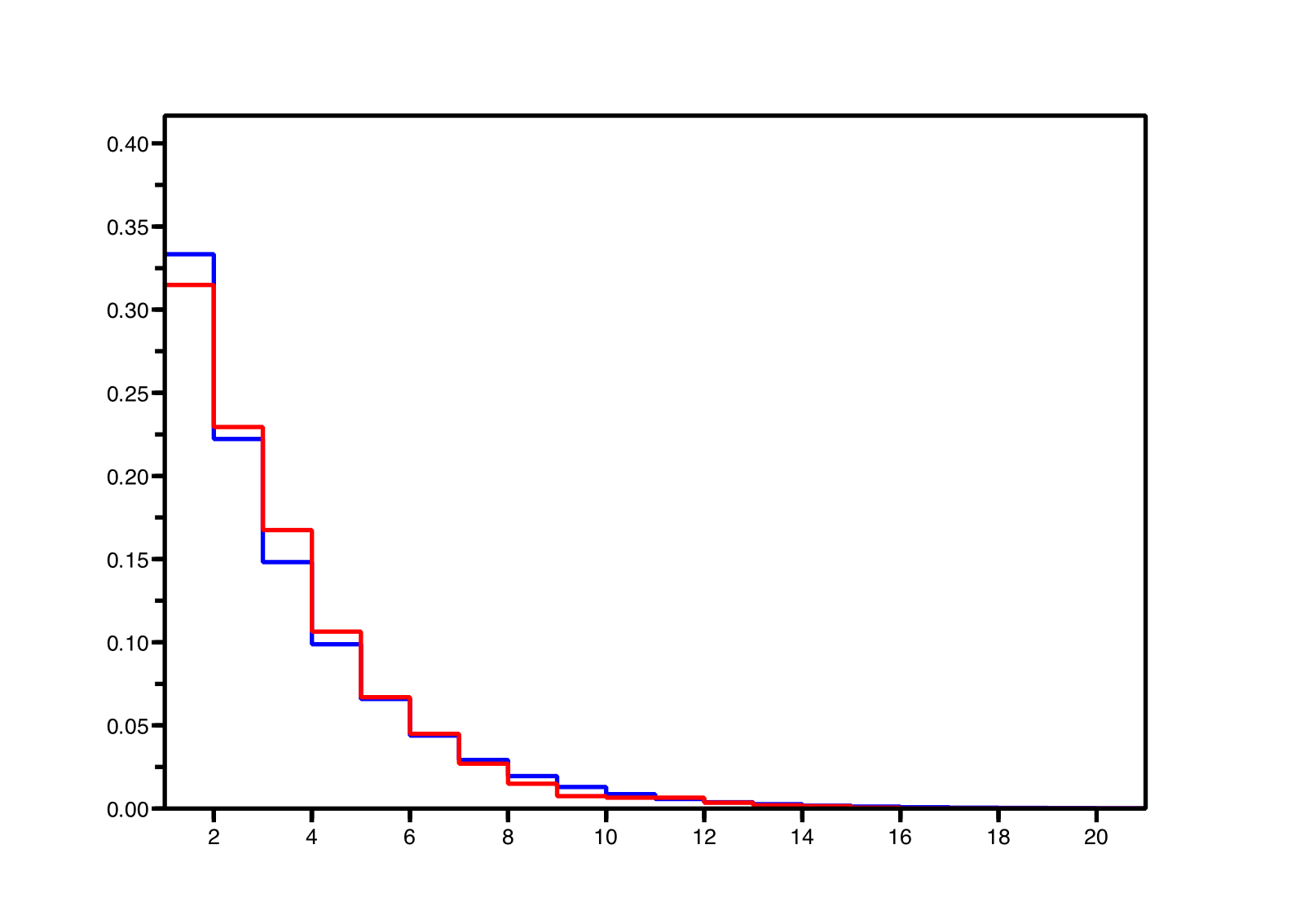 Distribution empirique (rouge) et distribution stationnaire (bleue) pour la marche réfléchie en 0 (0.4, 0.6 et 2000 pas, départ à la moyenne stationnaire)